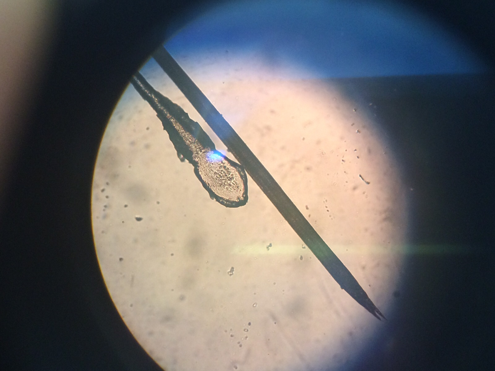 Un bulbo e l'estremità di un capello.